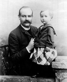 Johannes Weiß (* 13. Dezember 1863 in Kiel; † 24. August 1914 in Heidelberg) mit Kind.